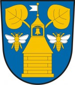 Horní Libochová